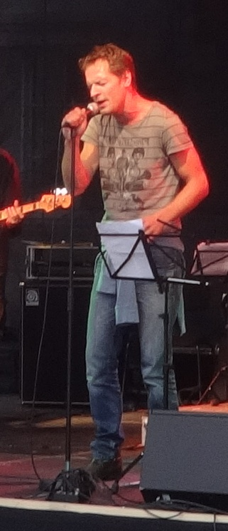 Matthias Luckey auf der Bühne vor dem Schauspielhaus Dresden zur Saisoneröffnung 2014